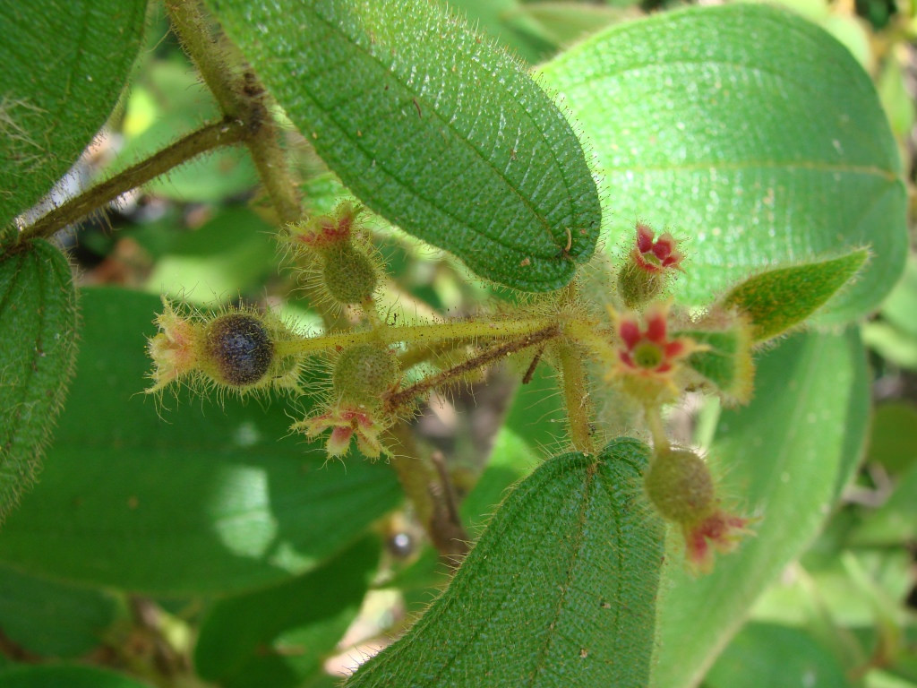 Clidemia urceolata DC. - MELASTOMATACEAE - Parque Nacional da Chapada Diamantina - Palmeiras - Bahia - Brasil.